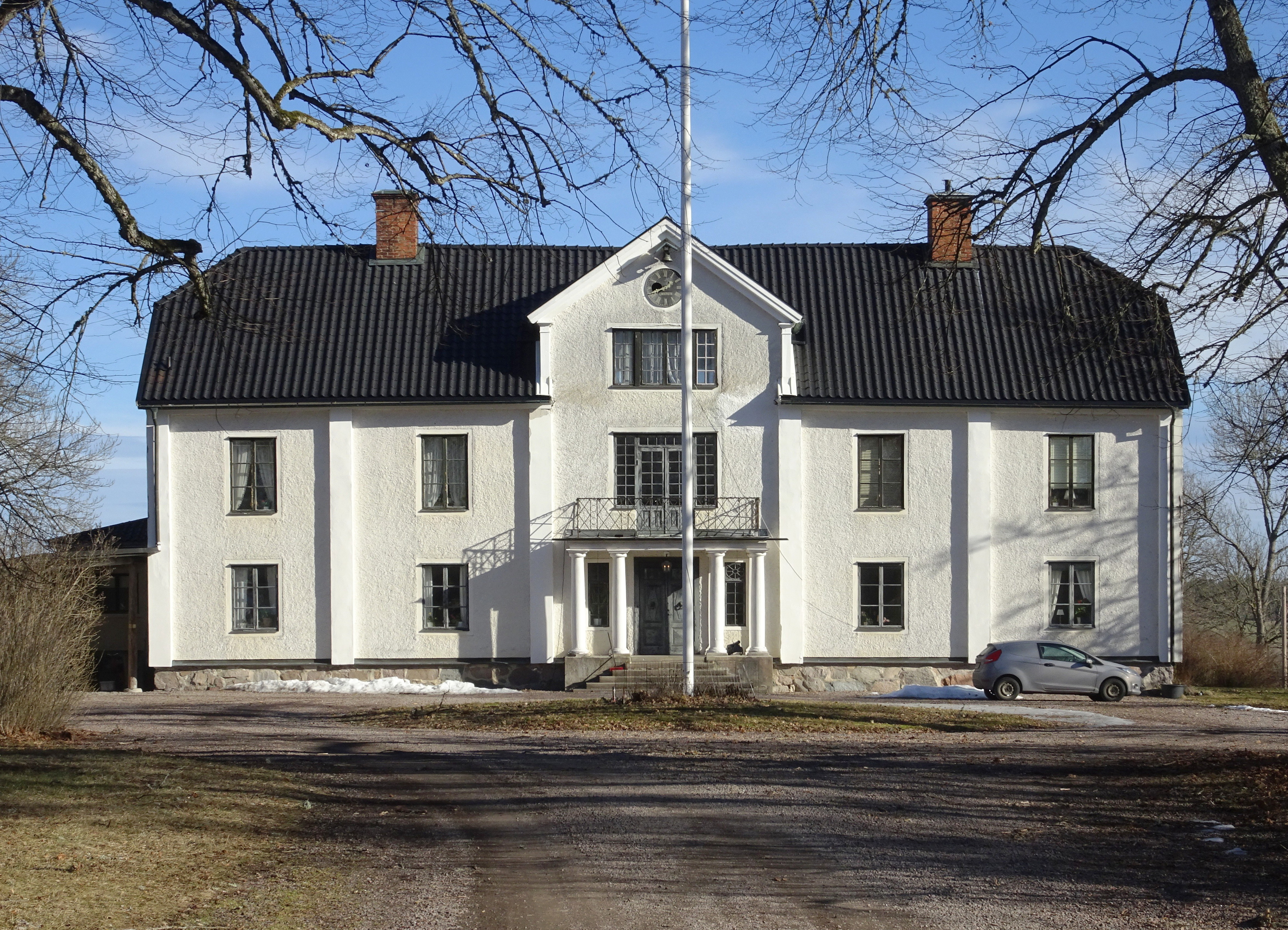 Hässelby gård, Uppsala, huvudbyggnad